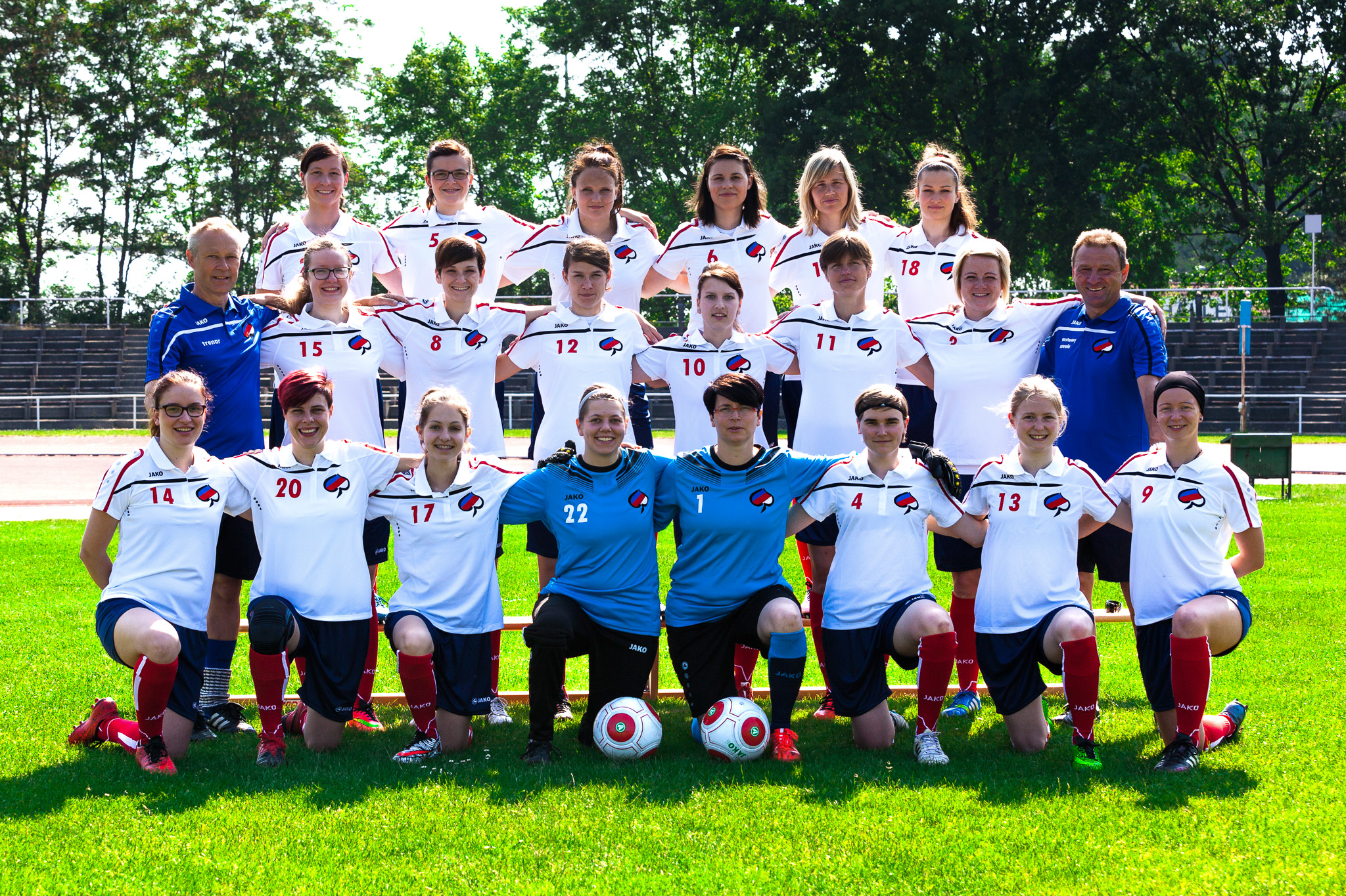 Hornjoserbsce: Serbska žónska wubranka za Europeadu 2016